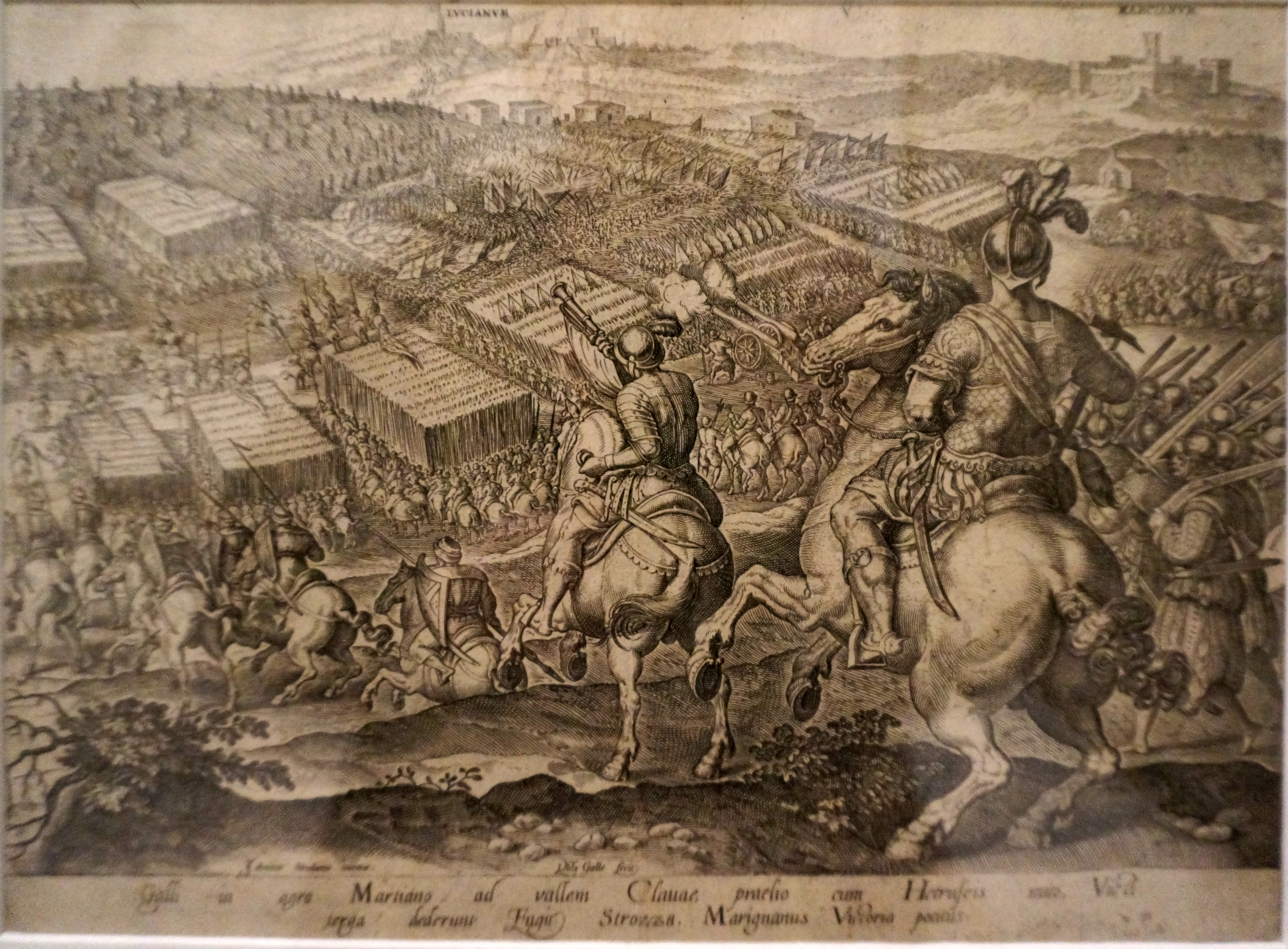 présenté lors de l'art et la guerre .